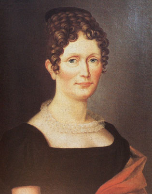 Christiane Schumann, im Jahr der Geburt ihres Sohnes Robert Schumann, im Alter von 43 Jahren. Ölgemälde von Gotthelf Leberecht Glaeser (1784–1851).